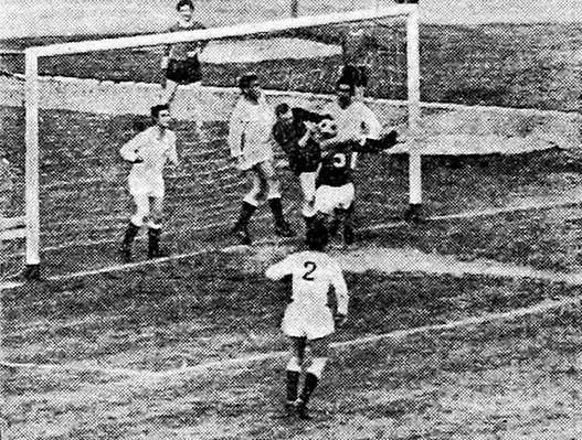 Pirc in Arnejčič v vratih med zadnjimi minutami tekme. Vabič posreduje pred Santračem